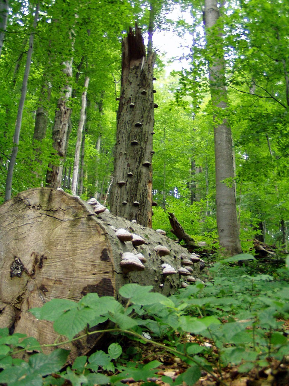 Národný park Poloniny